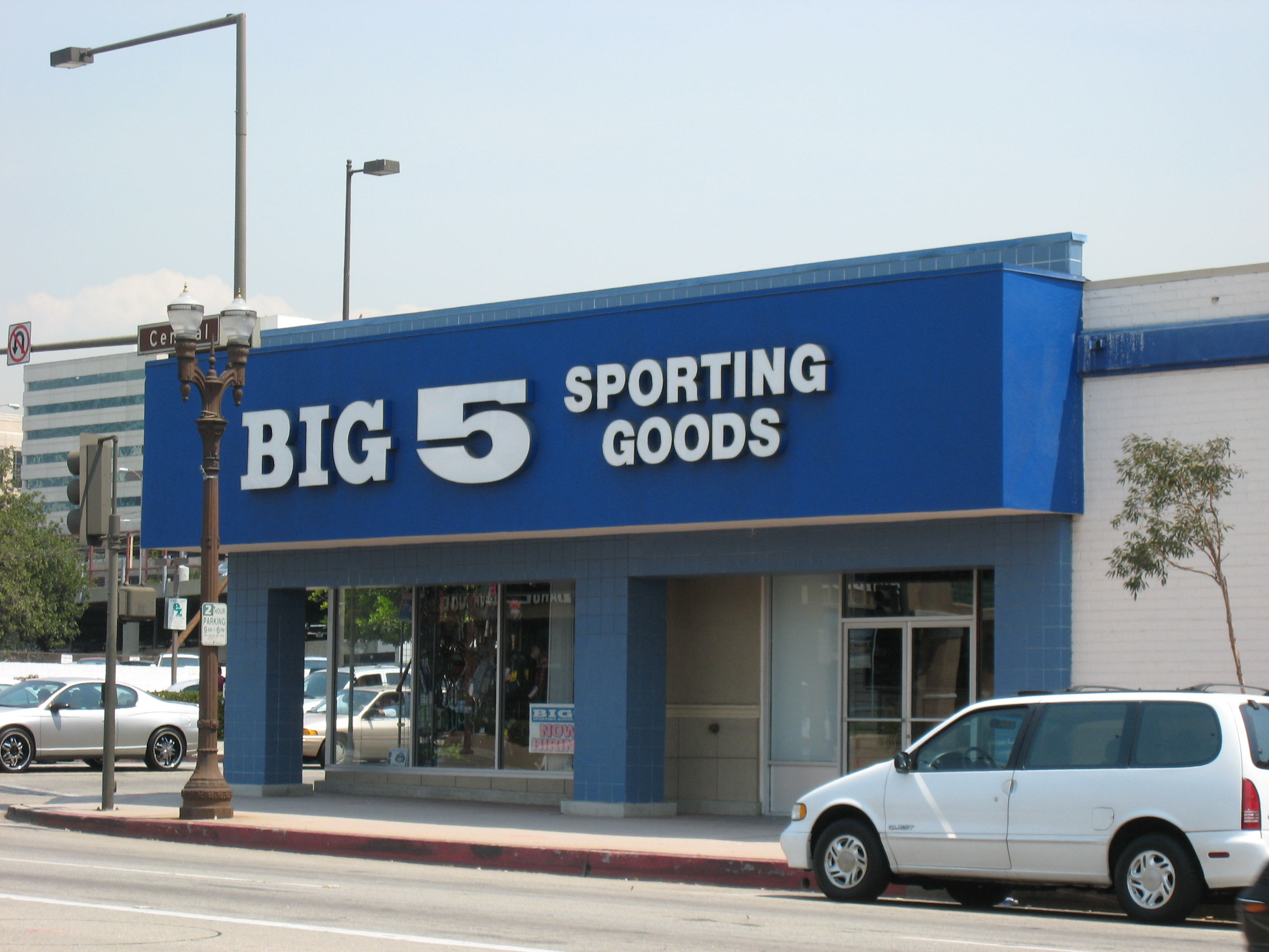 Big 5 store Glendale, California